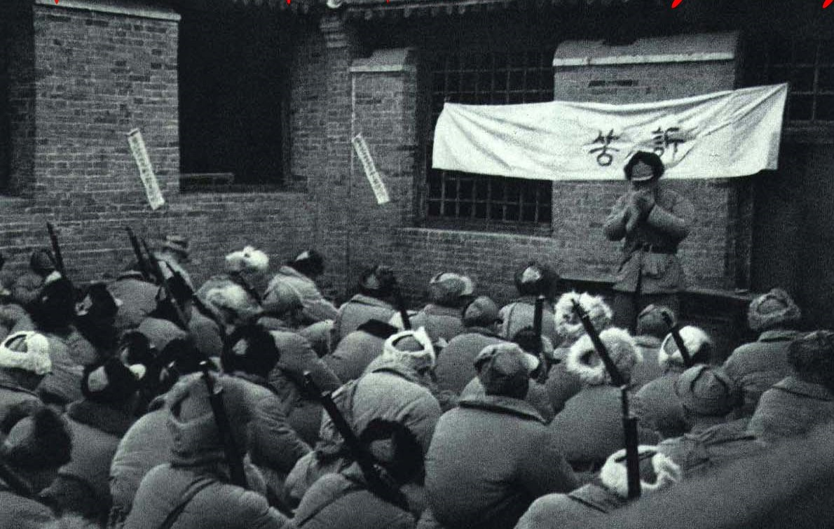 1967-10 1947年诉苦运动